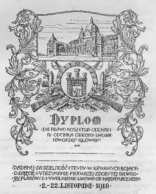 Dyplom do odznaki pamiątkowej IV Odcinka „Obrony Lwowa”. Autor rysunku: Rudolf Mękicki.